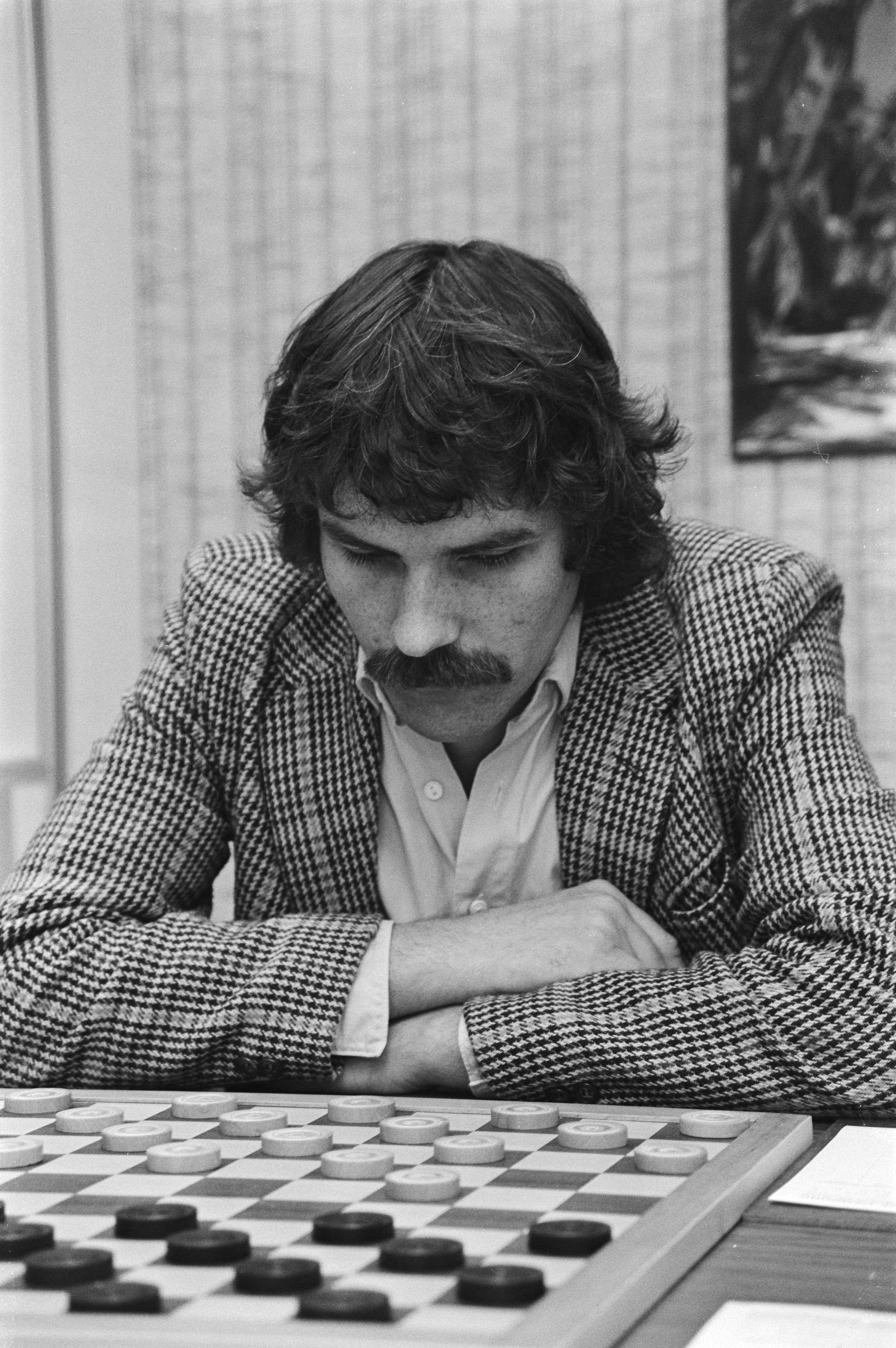 Harm Wiersma